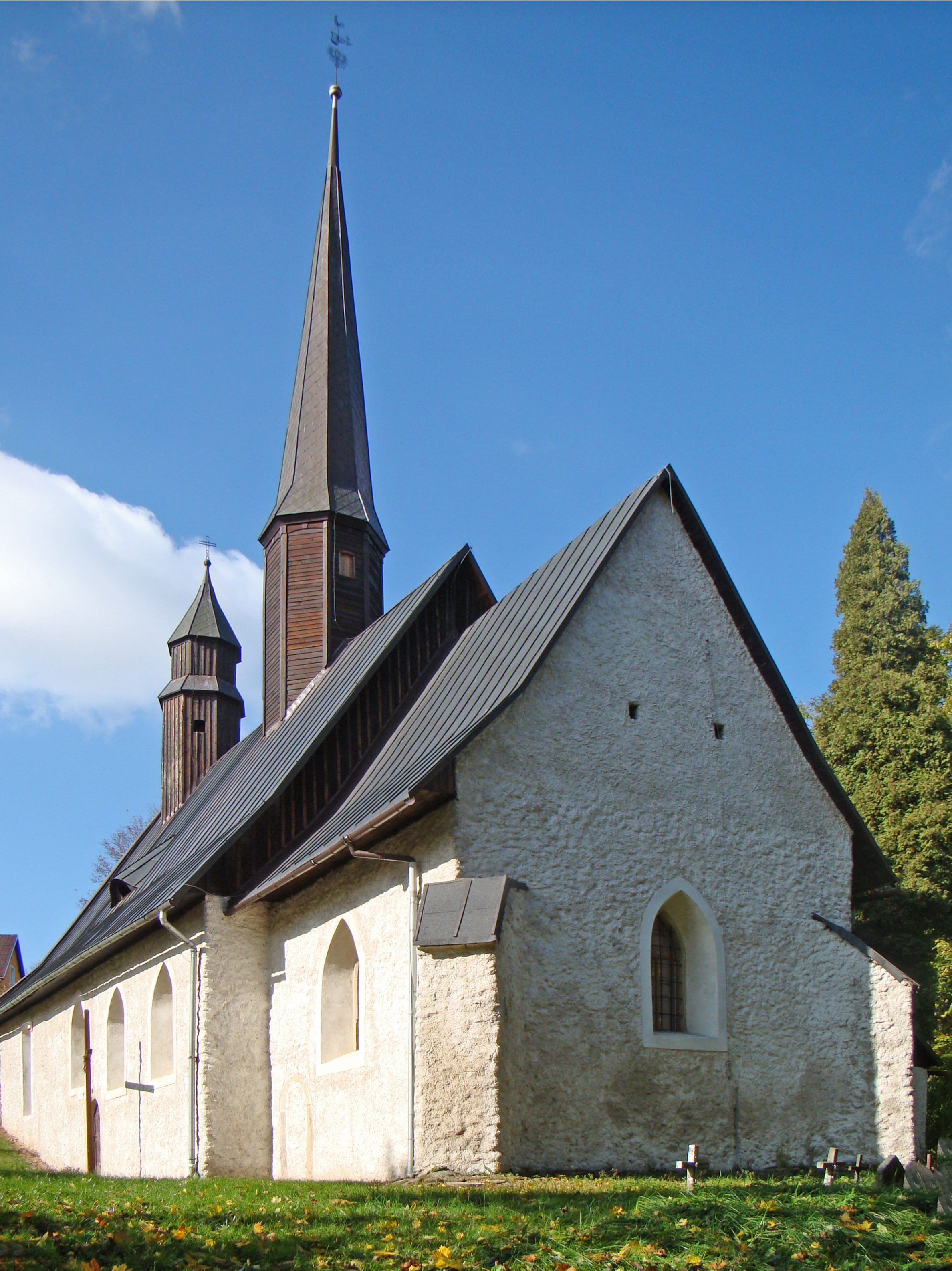 Olszyniec - dawny kościół ewangelicki, obecnie rzymskokatolicki filialny p.w. śś. Joachima i Anny, 1593, 1926 (zabytek nr A/1730/673 z 30.03.1960)